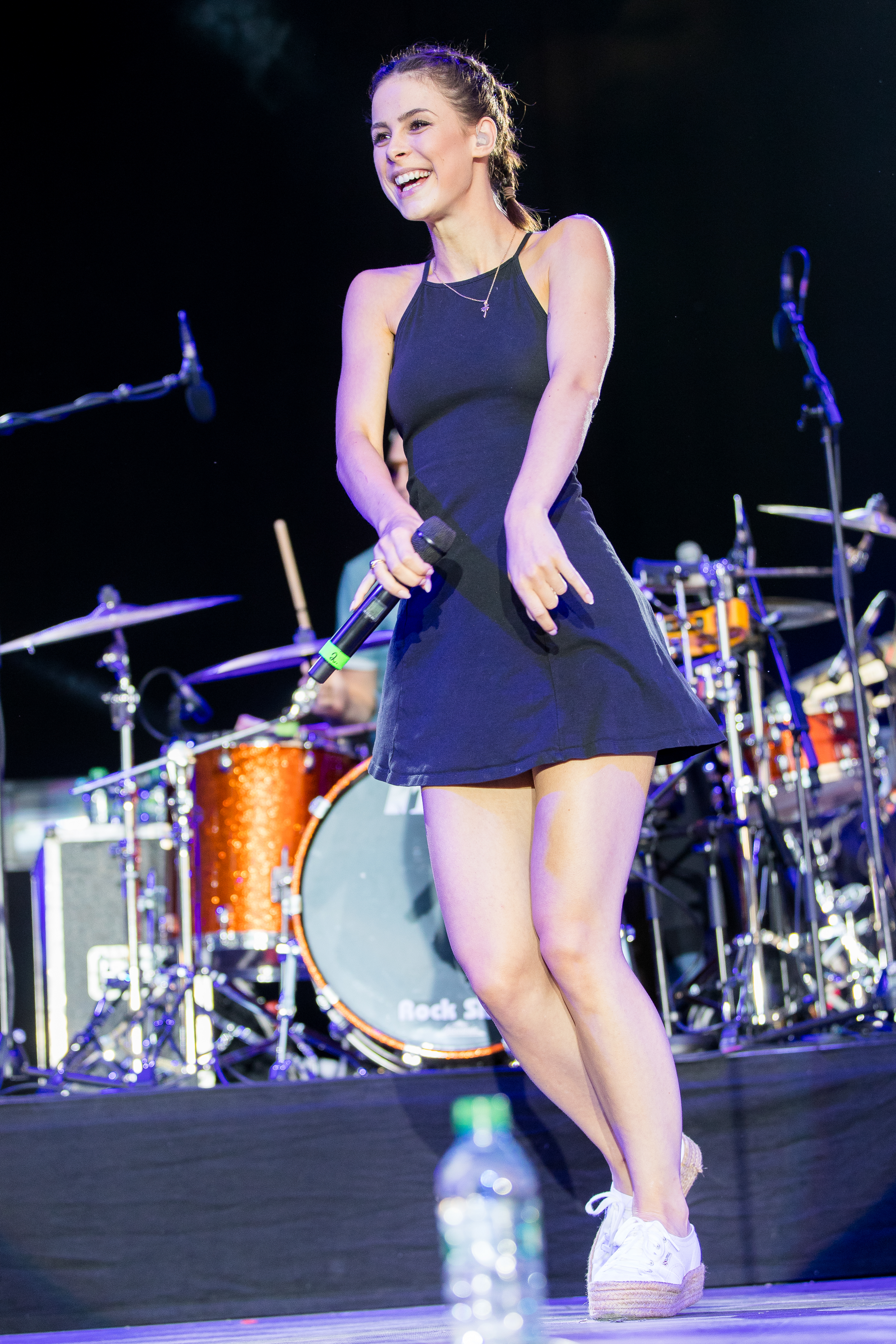 during Stadtfest Ludwigshafen at Stadt, Ludwigshafen, Rheinland Pfalz, Germany on 2016-07-09, Photo: Sven Mandel